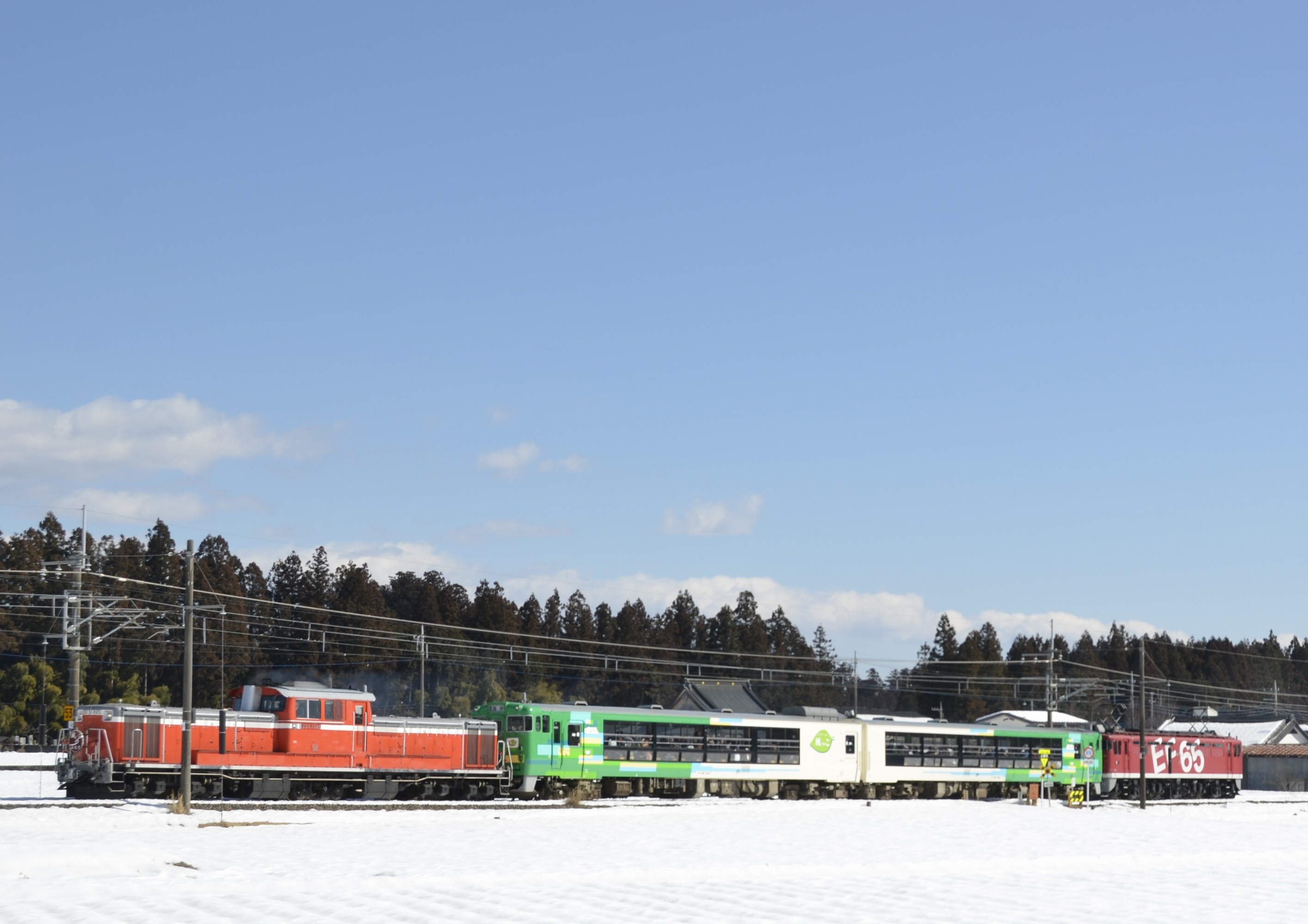 DD10とFE85による風っ子号のプッシュ・プル